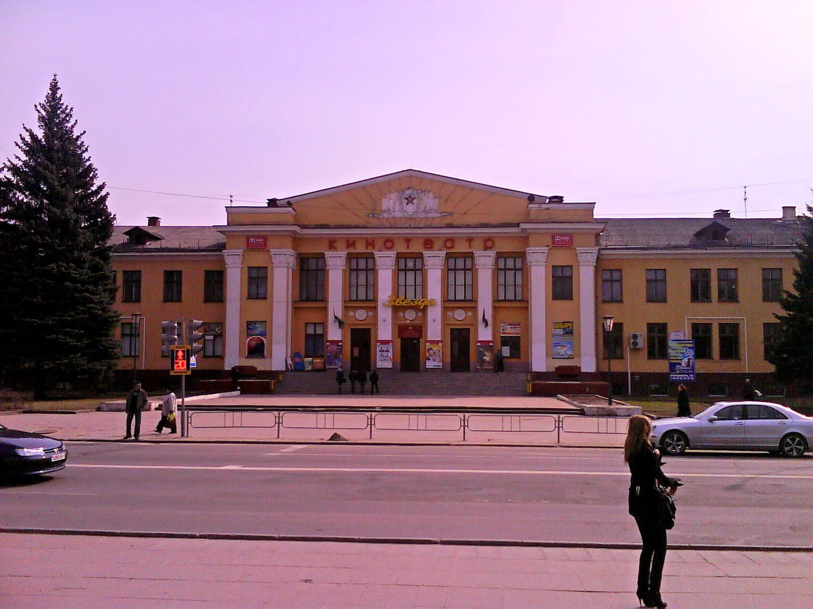 кинотеатр Звезда / дом офицеров